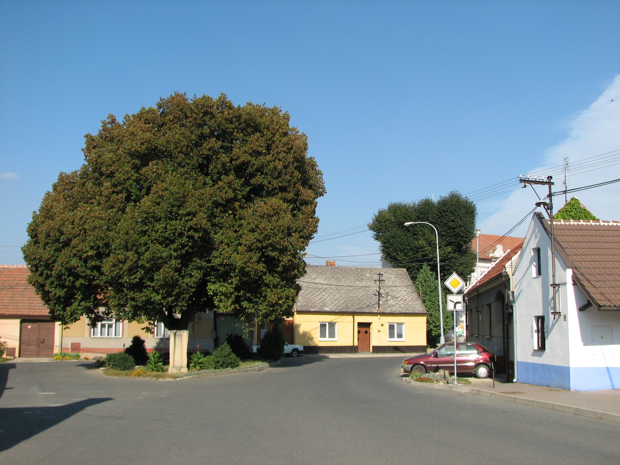 Česky: Skoronice - náves